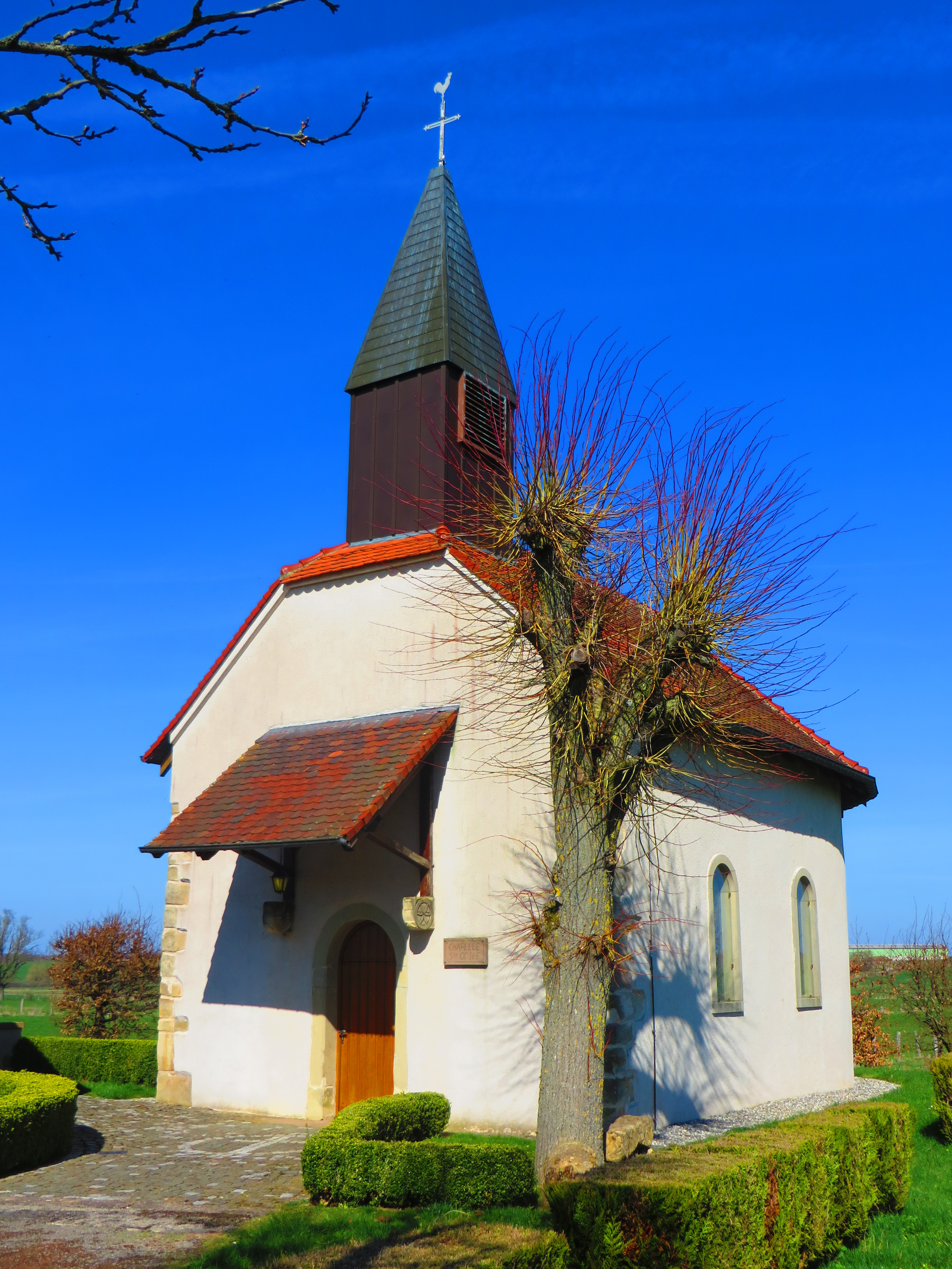 Maxstadt Chapelle Sainte-Odile